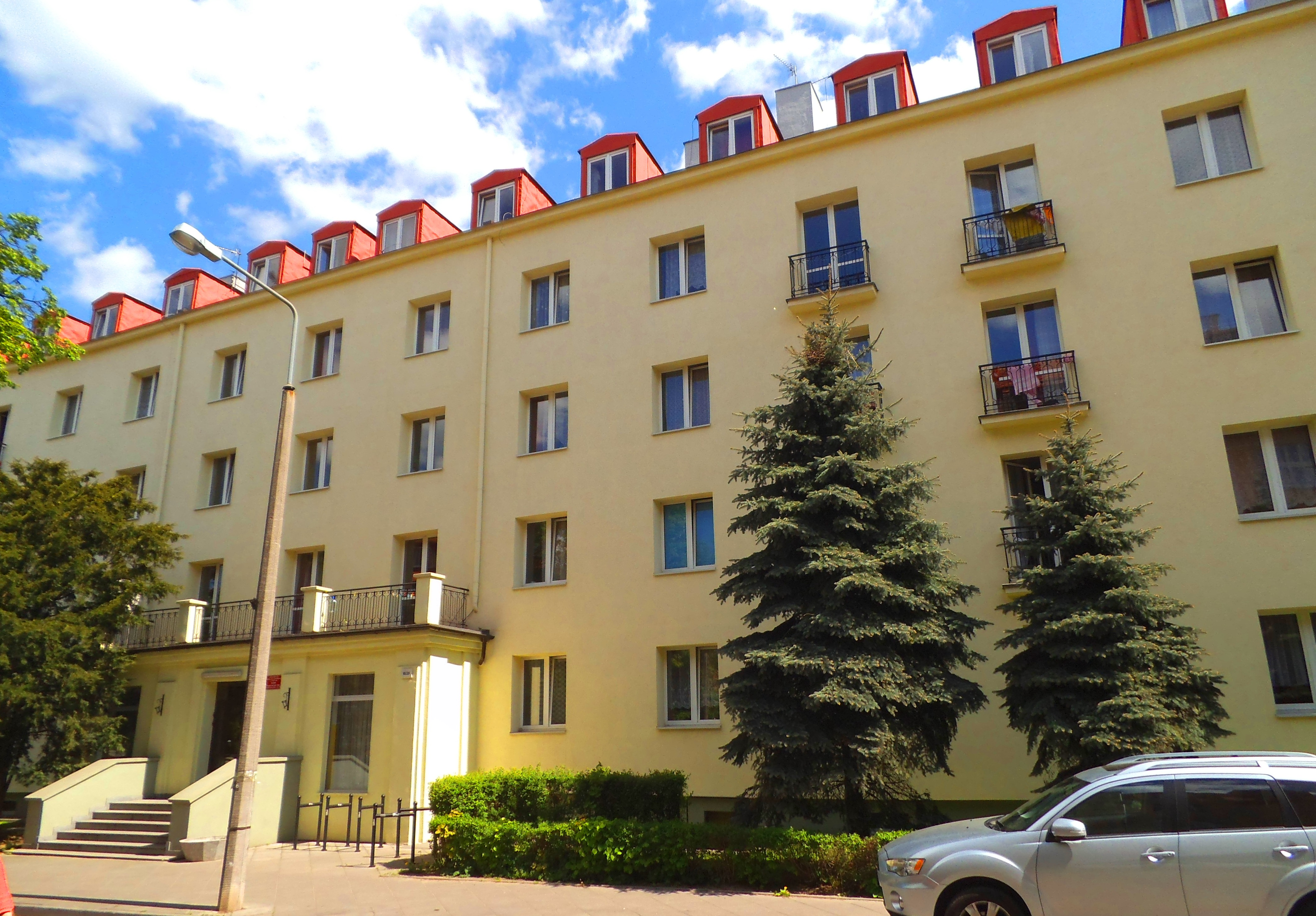 Dom Studencki UMK nr 3 w Toruniu